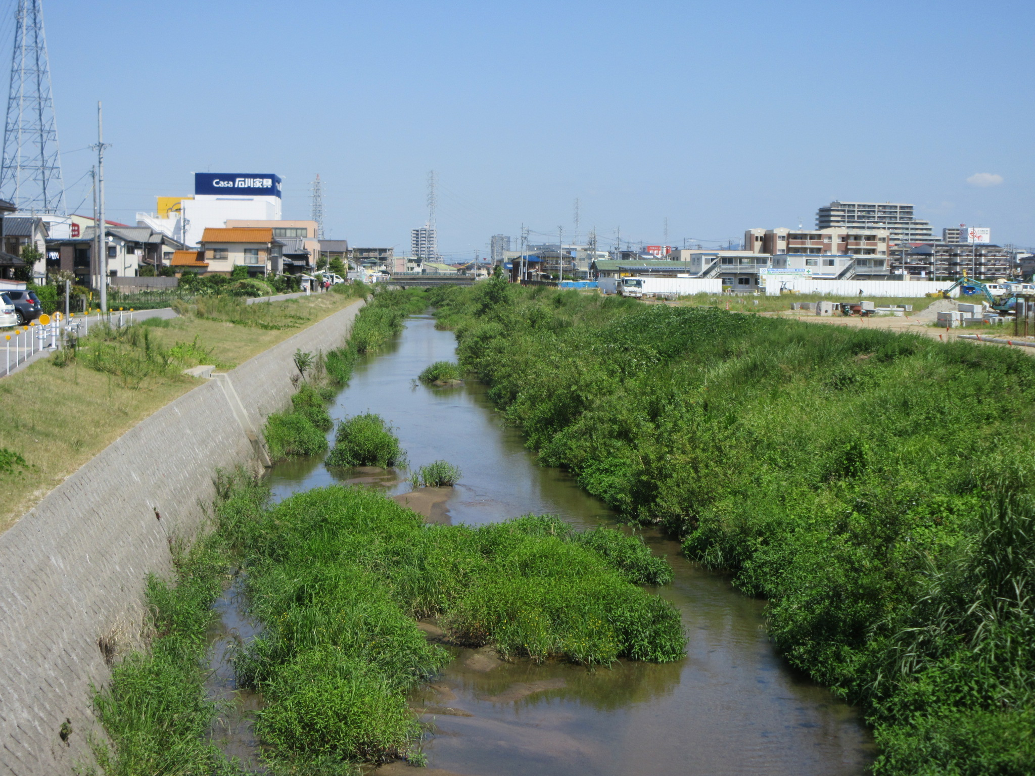 占部川。川の左側は岡崎市井内町。右側は柱町下地。